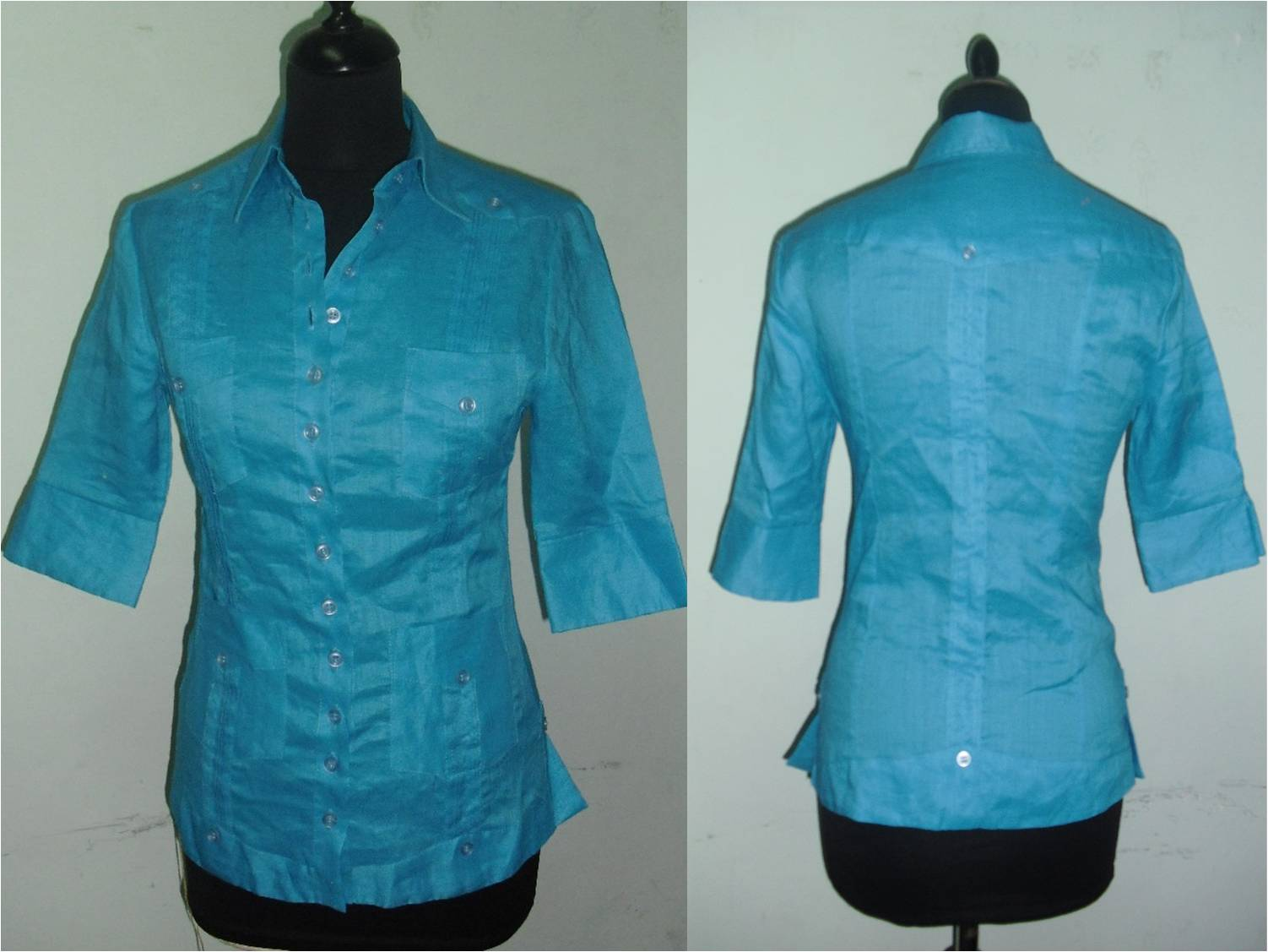 Confeccionada en Lino Irlandes Conservando las caracteristicas basicas de una guayabera tradicional ( Cuello Camisero, Canesú, alforzas, charreteras,. botones decorativos,bases delanteras y trasera